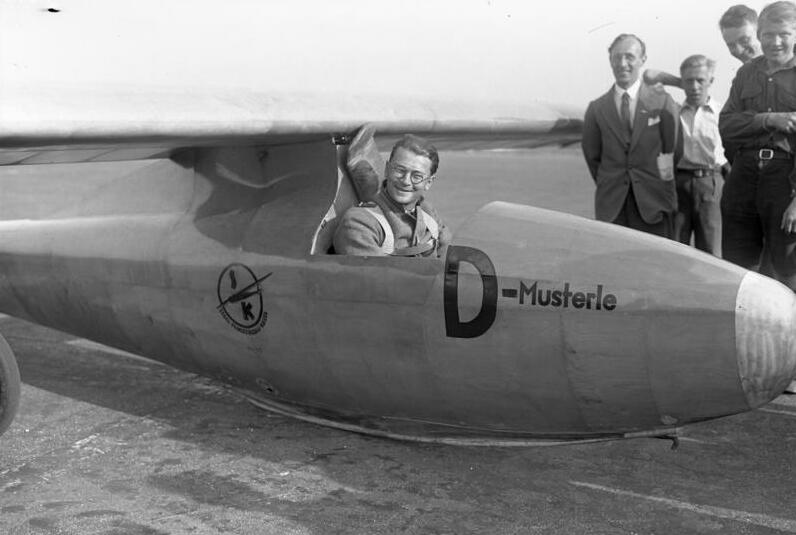 Der Deutsche Wolkenkratzer-Flieger Wolf Hirt, welcher erfolgreich über New York Segelflüge absolvierte, startete zu einem 2- Stundenflug über dem Häusermeer Berlins. Er landete wohlbehalten auf dem Centralflughafen in Berlin. Wolf Hirt, der erfolgreiche Segelflieger in seinem Segelflugzeug "Musterle" vor seinem Start über dem Häusermeer Berlins.